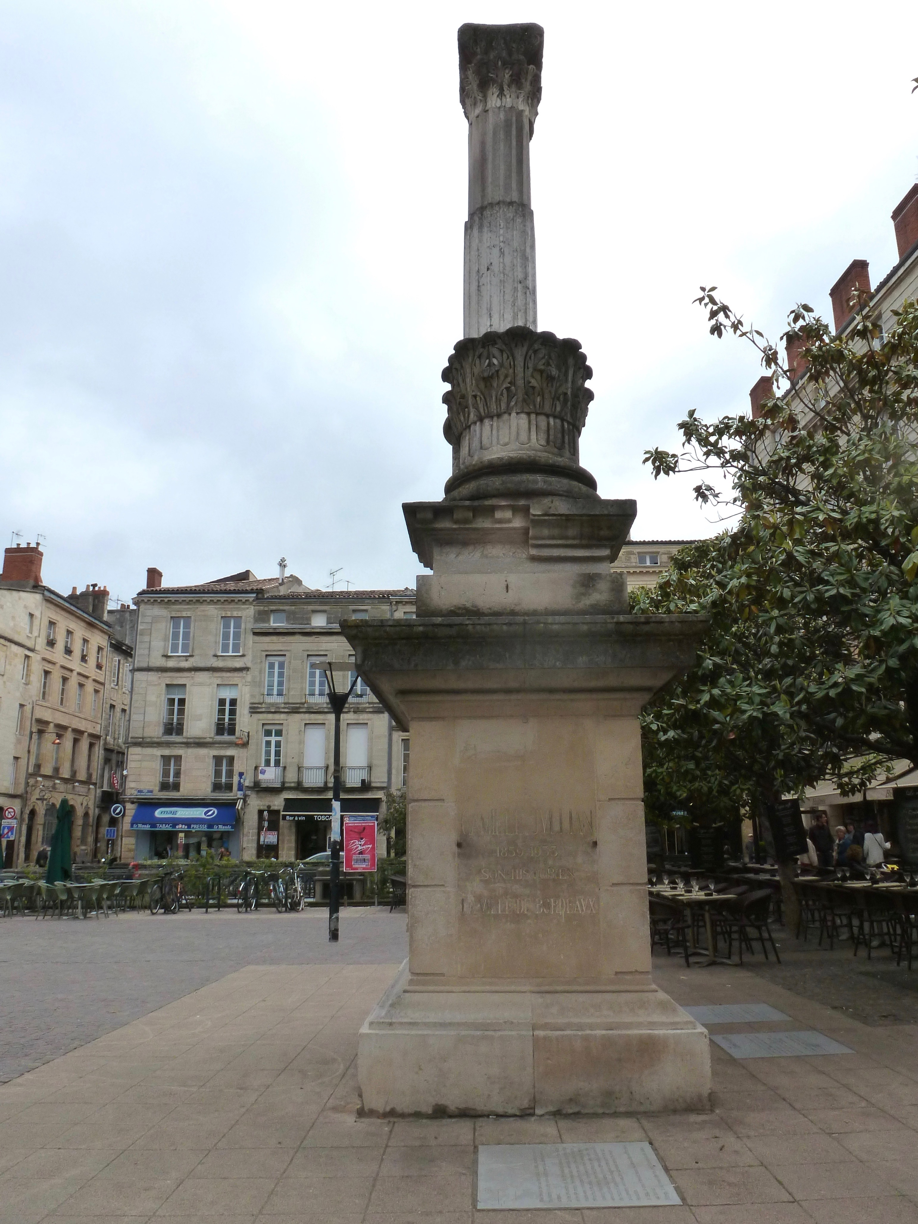 Monument à Camille Jullian, Place Camille Jullian à Bordeaux-33.